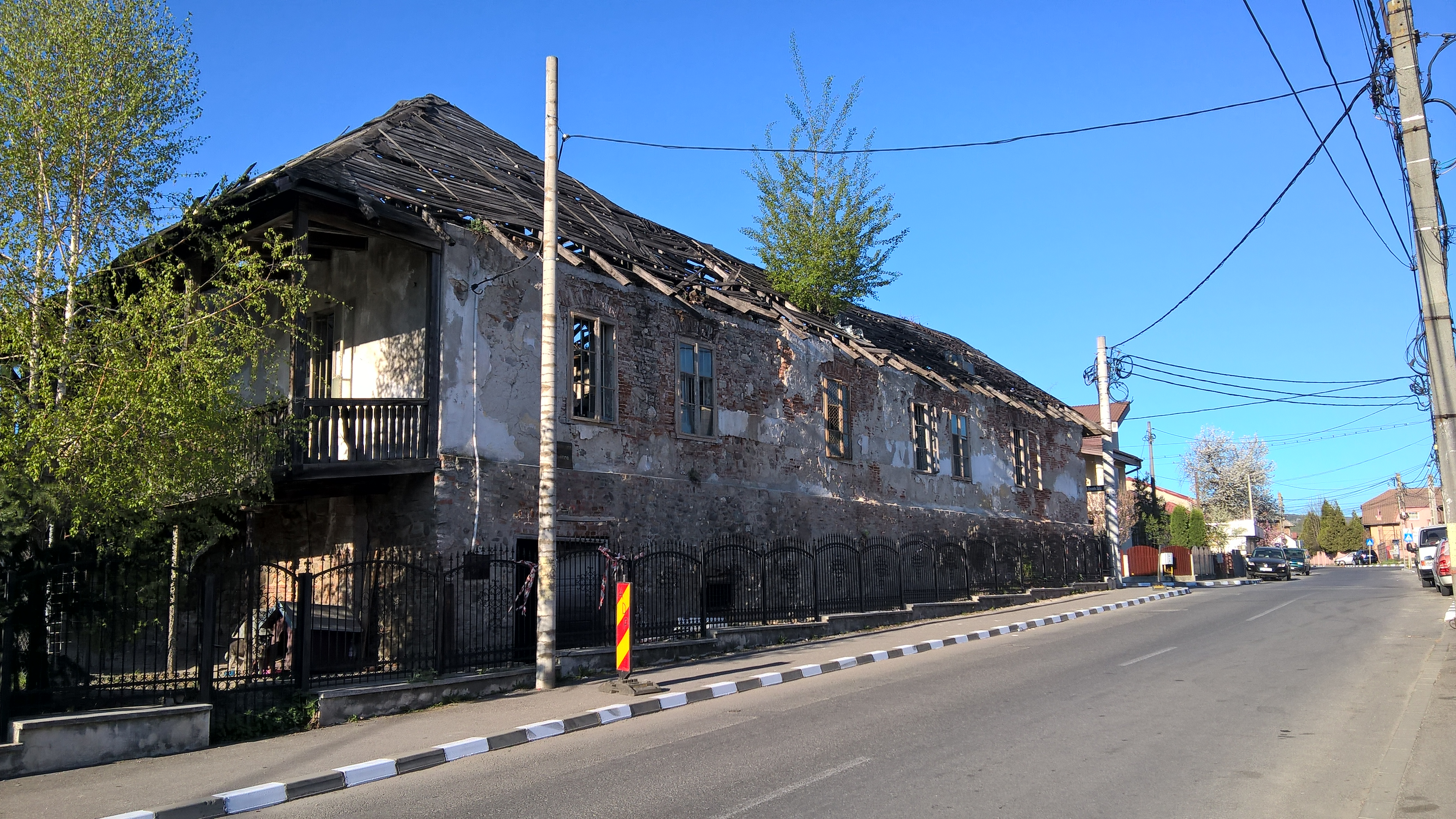 Casa Olănescu (sec. XVIII) -municipiul Râmnicu Vâlcea, Str. Antim Ivireanu 17 02